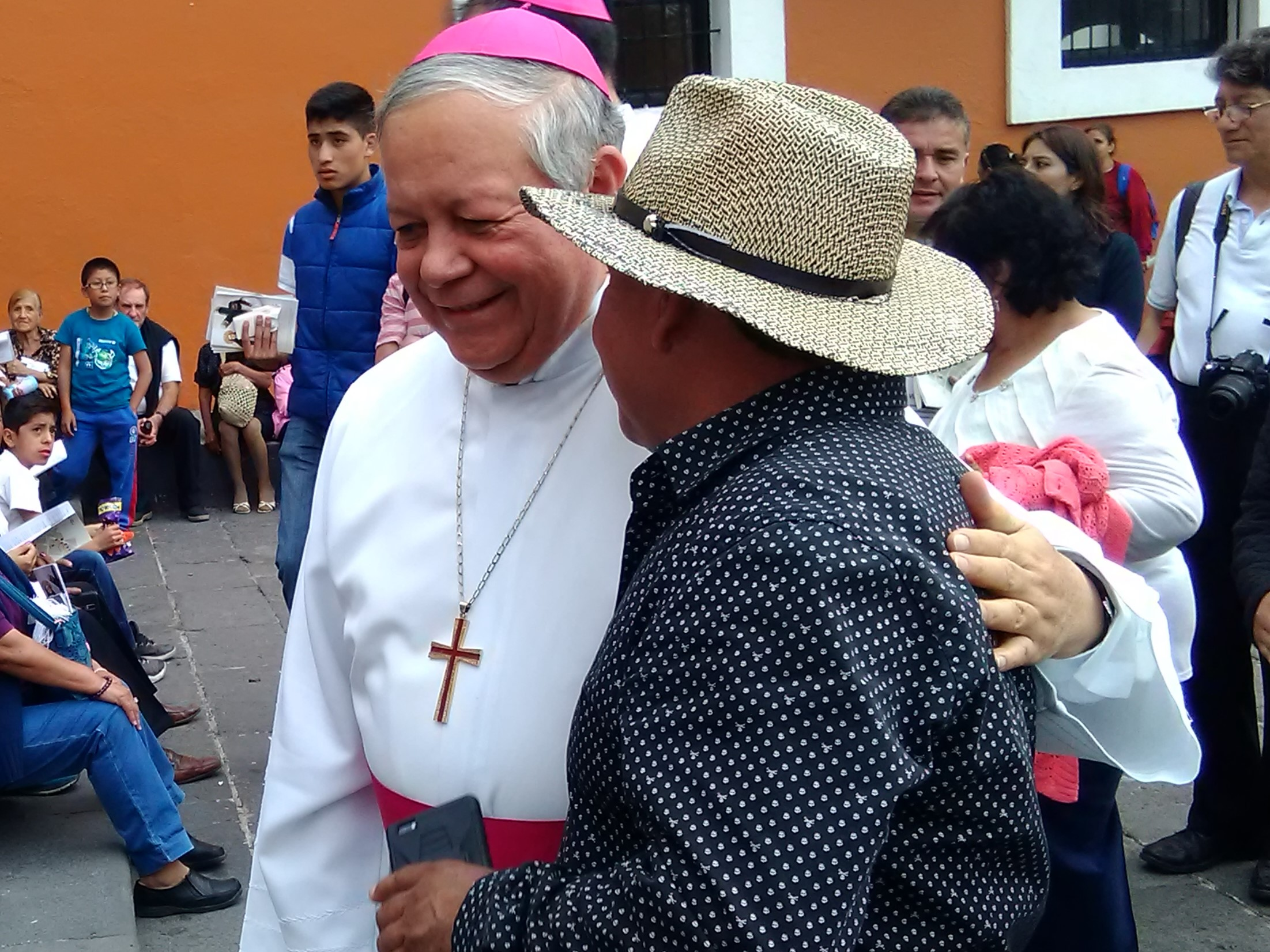 Arzobispo de Puebla, Mons. Víctor Sánchez Espinosa